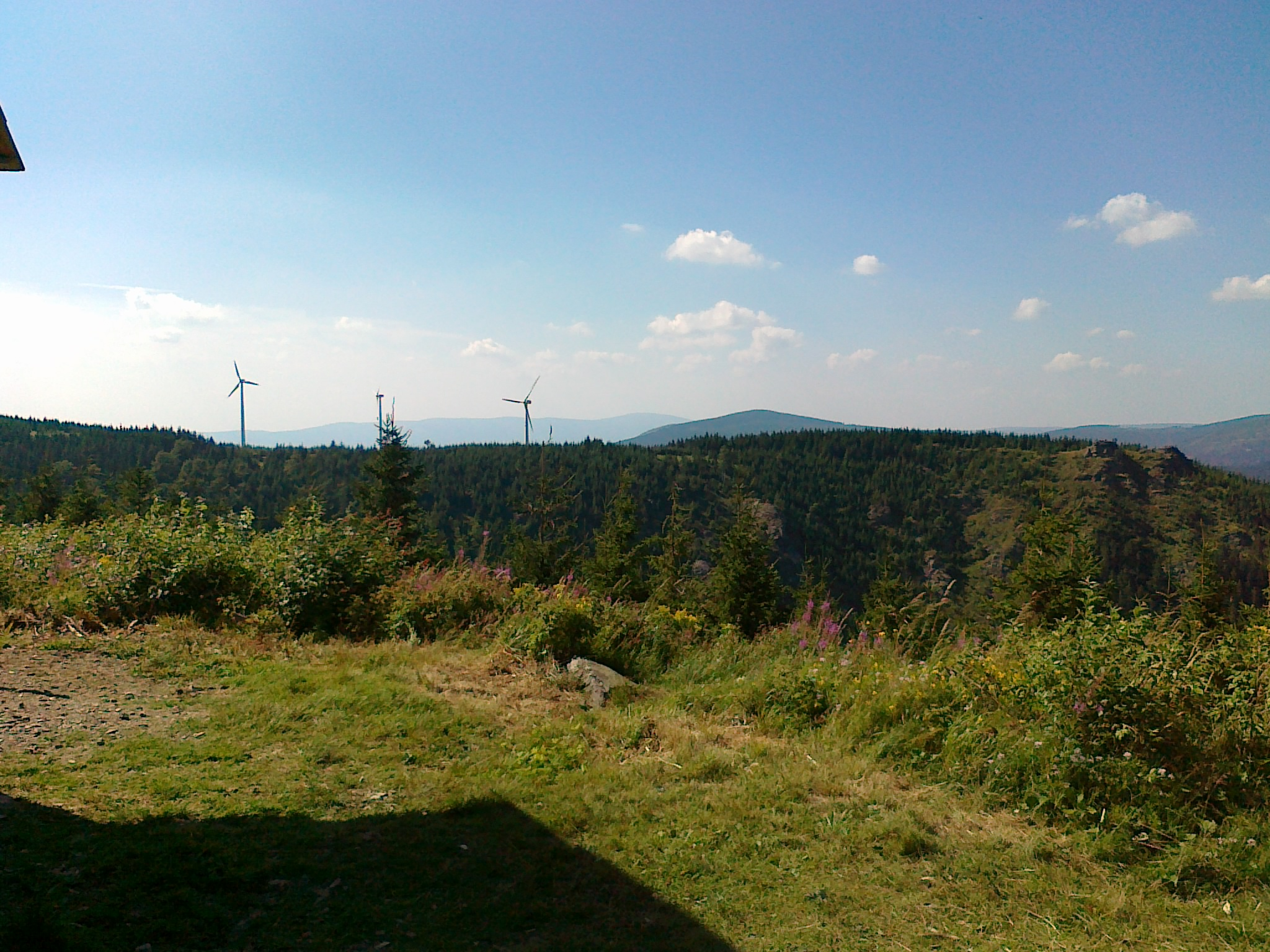 Widok sprzed domku turystycznego Salaš na stoku góry Dlouhé stráně na szczyt Medvědí hora, powyżej szczyt góry Černá stráň